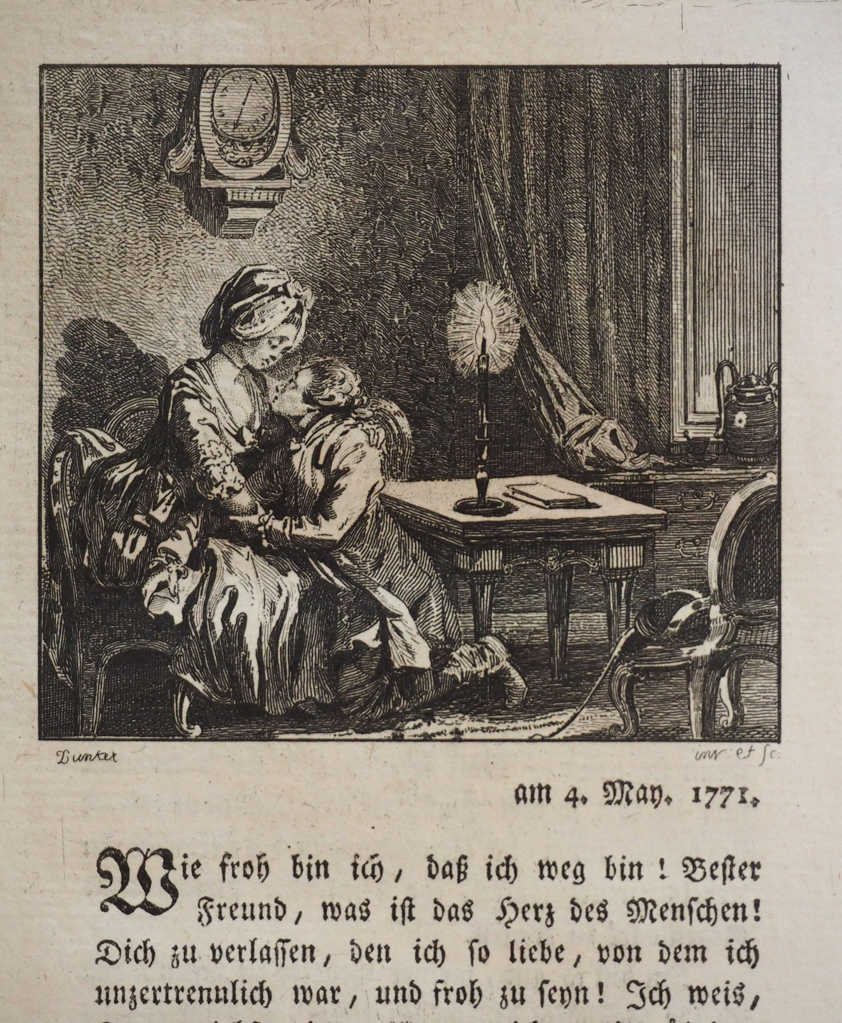 Bibliothek für den guten Geschmack, Band 11